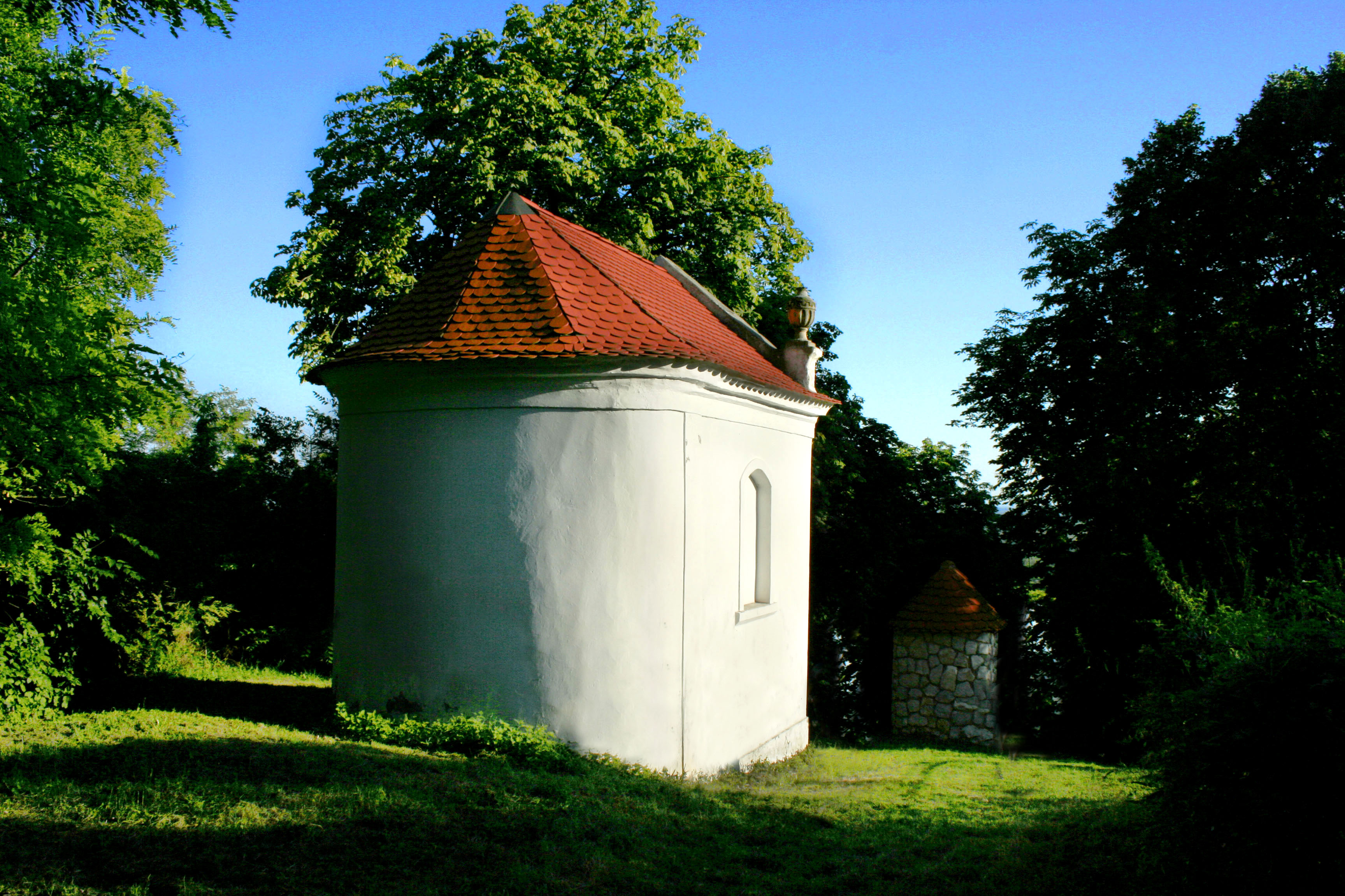 Máriagyüd - Kálvária, központi kápolna